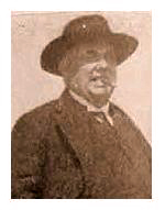 Gaspar Bennazar Moner